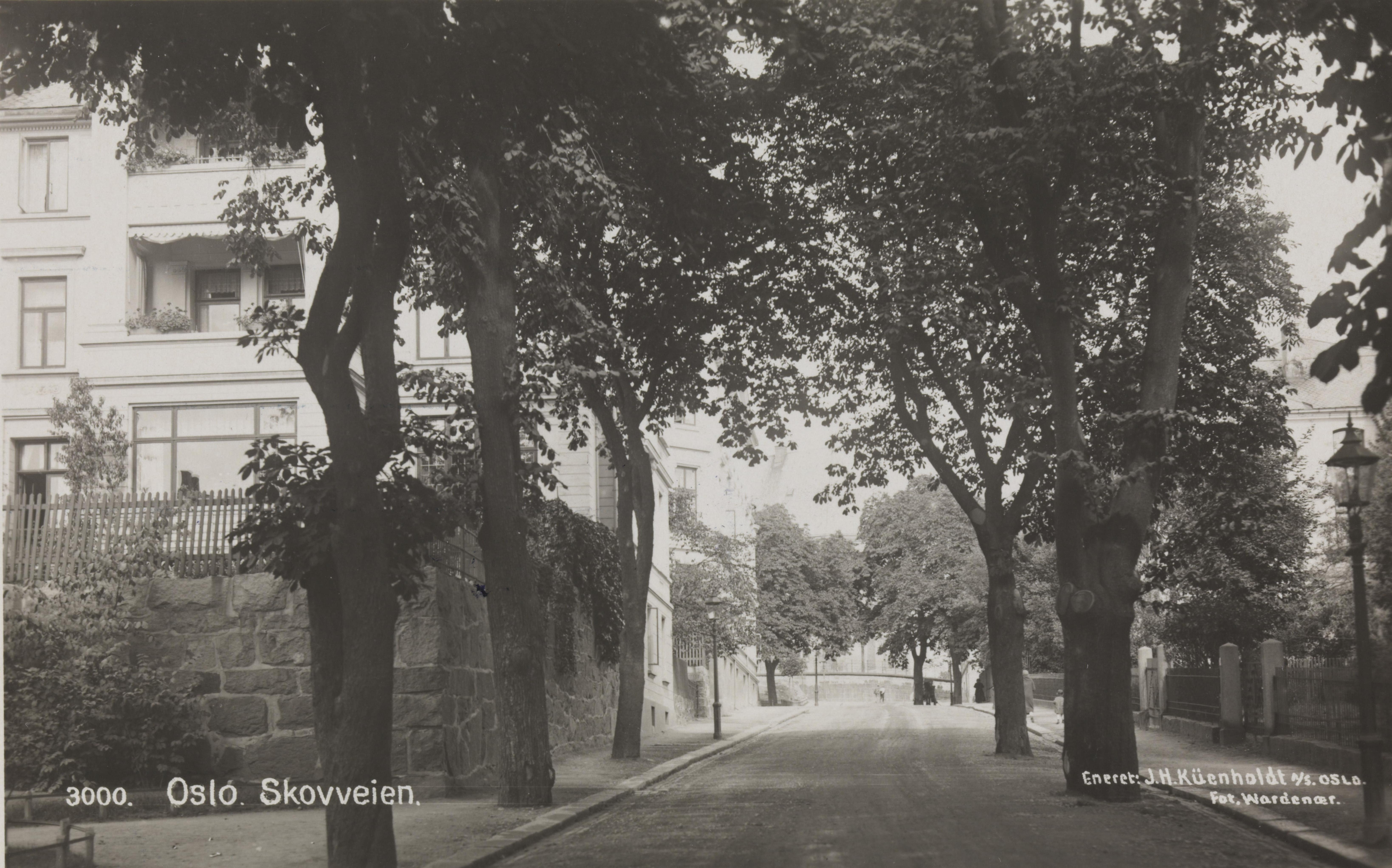 Bildet er hentet fra Nasjonalbibliotekets bildesamling Frogner,Skovveien, Oslo, Oslo